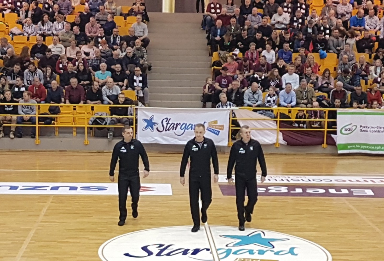 Sędziowie meczu Spójnia-Start Lublin (03.01.2019)